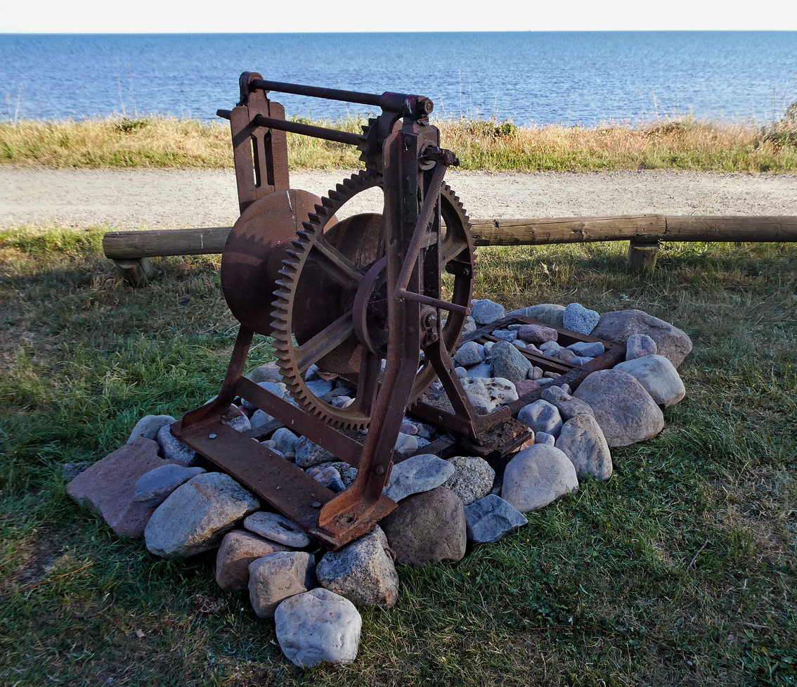 En gammal vinsch (även kallat "spel") för att dra upp båtar på land, står nu som ett minne vid Världens ände i Ystad.